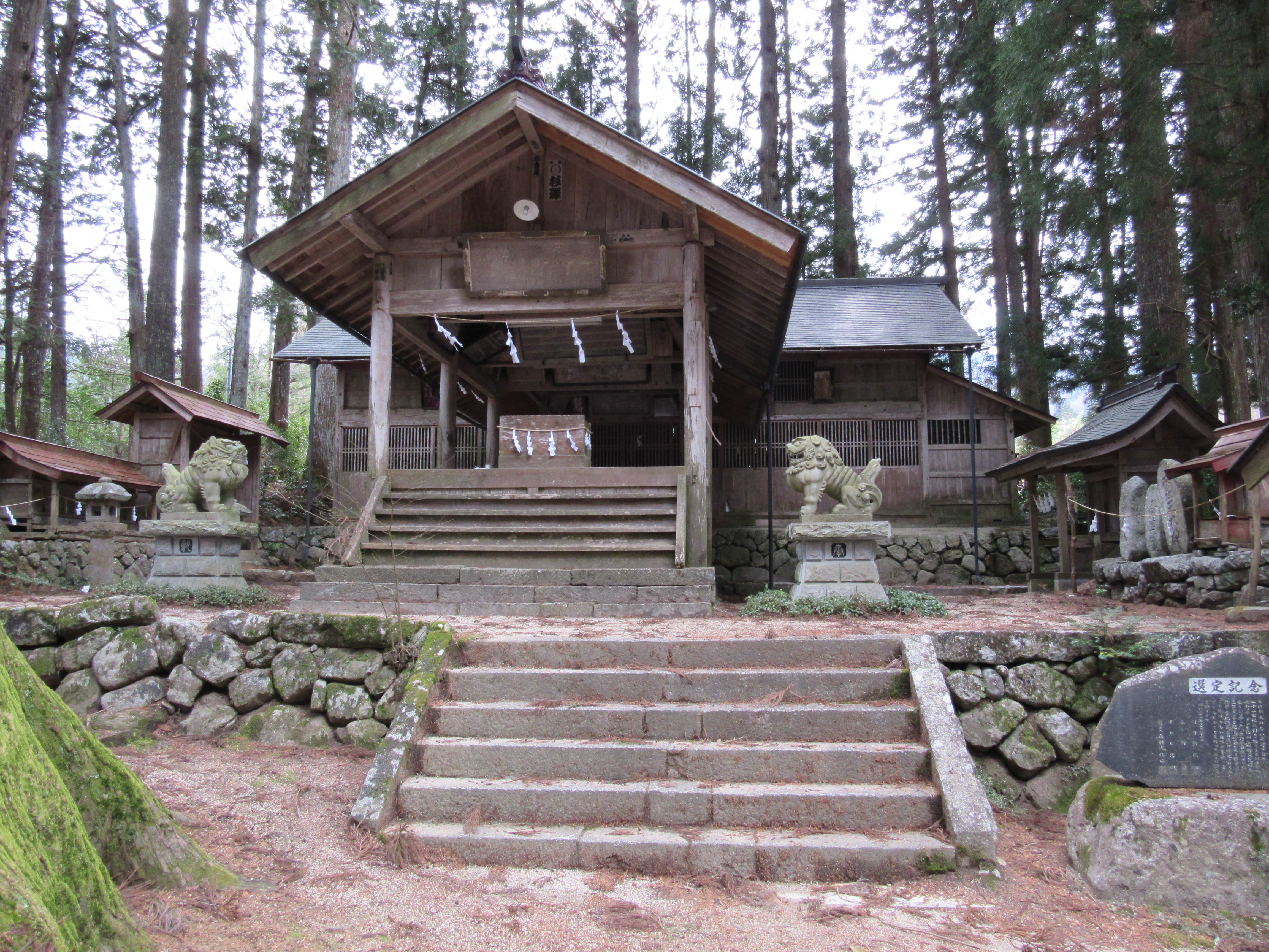 下條村・大山田神社